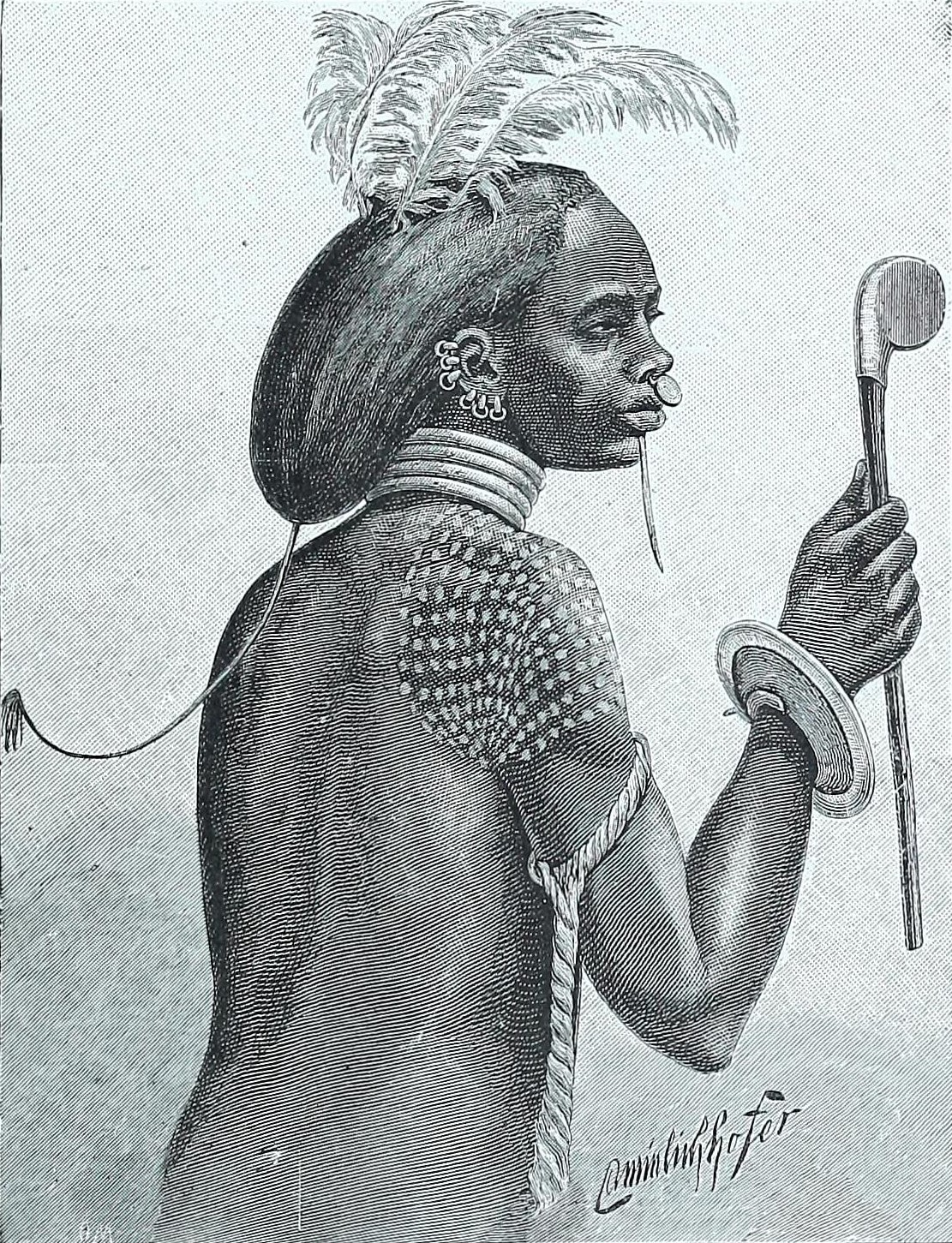 Turkana Warrior, 1888